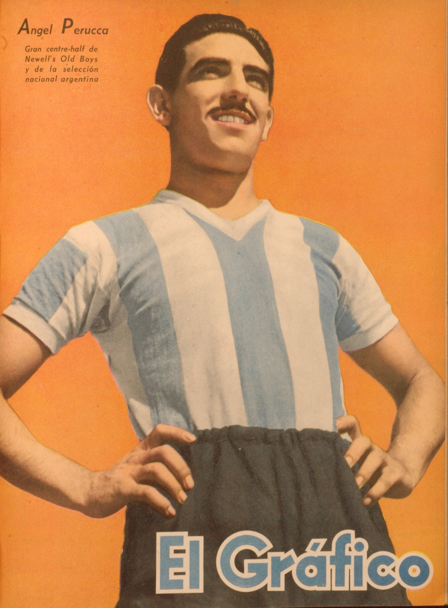 El Grafico del 13 de Febrero de 1942. Edicion 1179